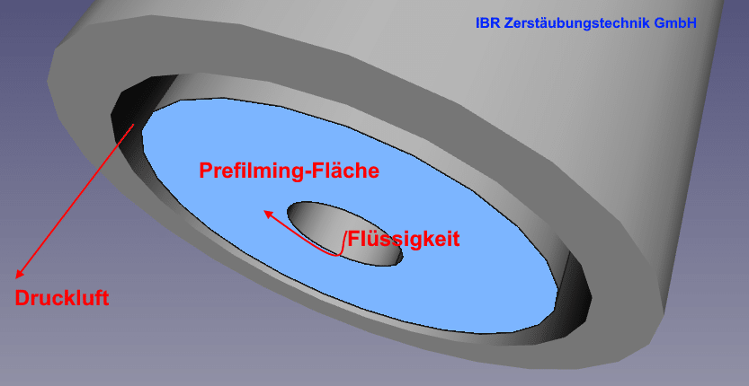 Die Prefilming-Fläche an der Zweistoff-Düse äußerer Mischung ist maßgeblich für die Feinheit der Zerstäubung.